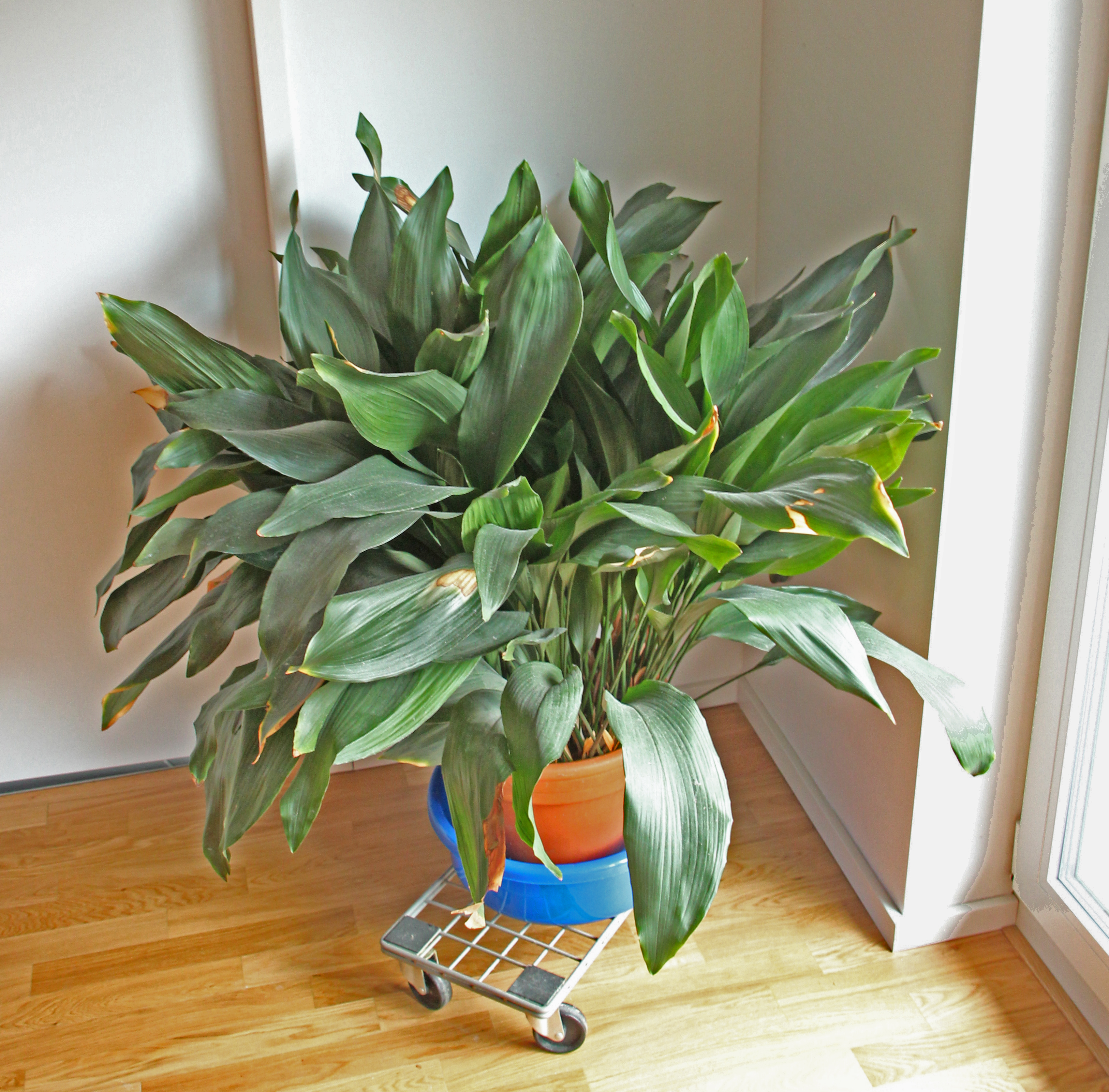 Bildinhalt: Schusterpalme, etwa elf Jahre alt Aufnahmeort: Frankfurt am Main, Deutschland